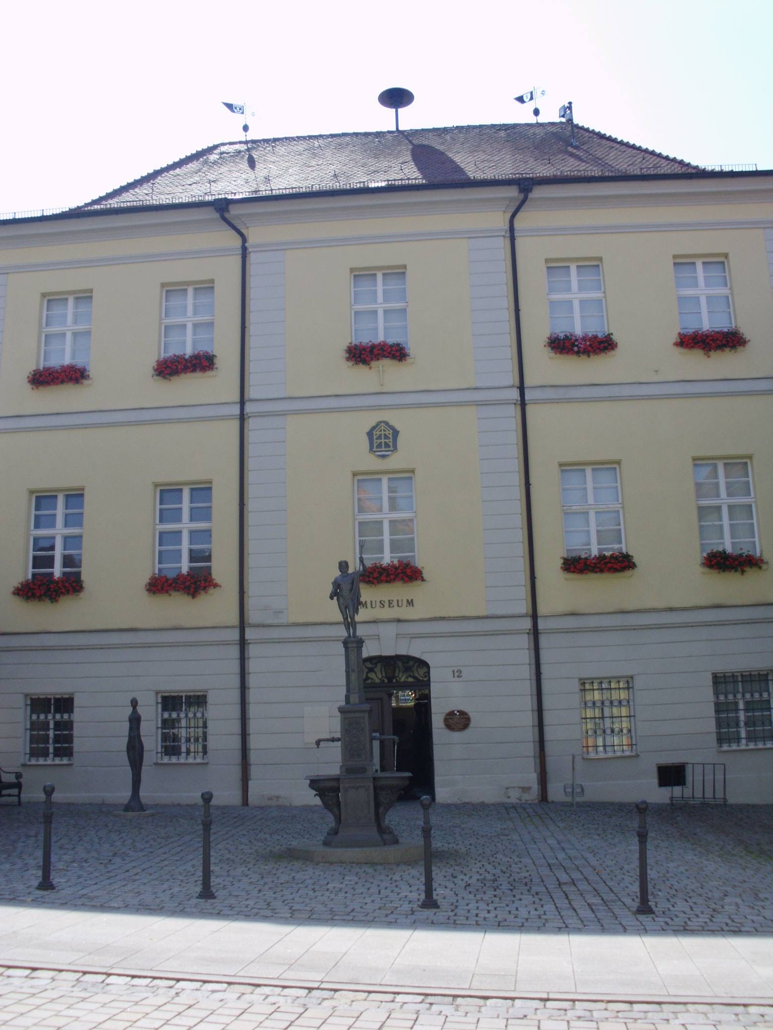 Gunzenhausen im mittelfränkischen Landkreis Weißenburg-Gunzenhausen, Rathausstr. 12